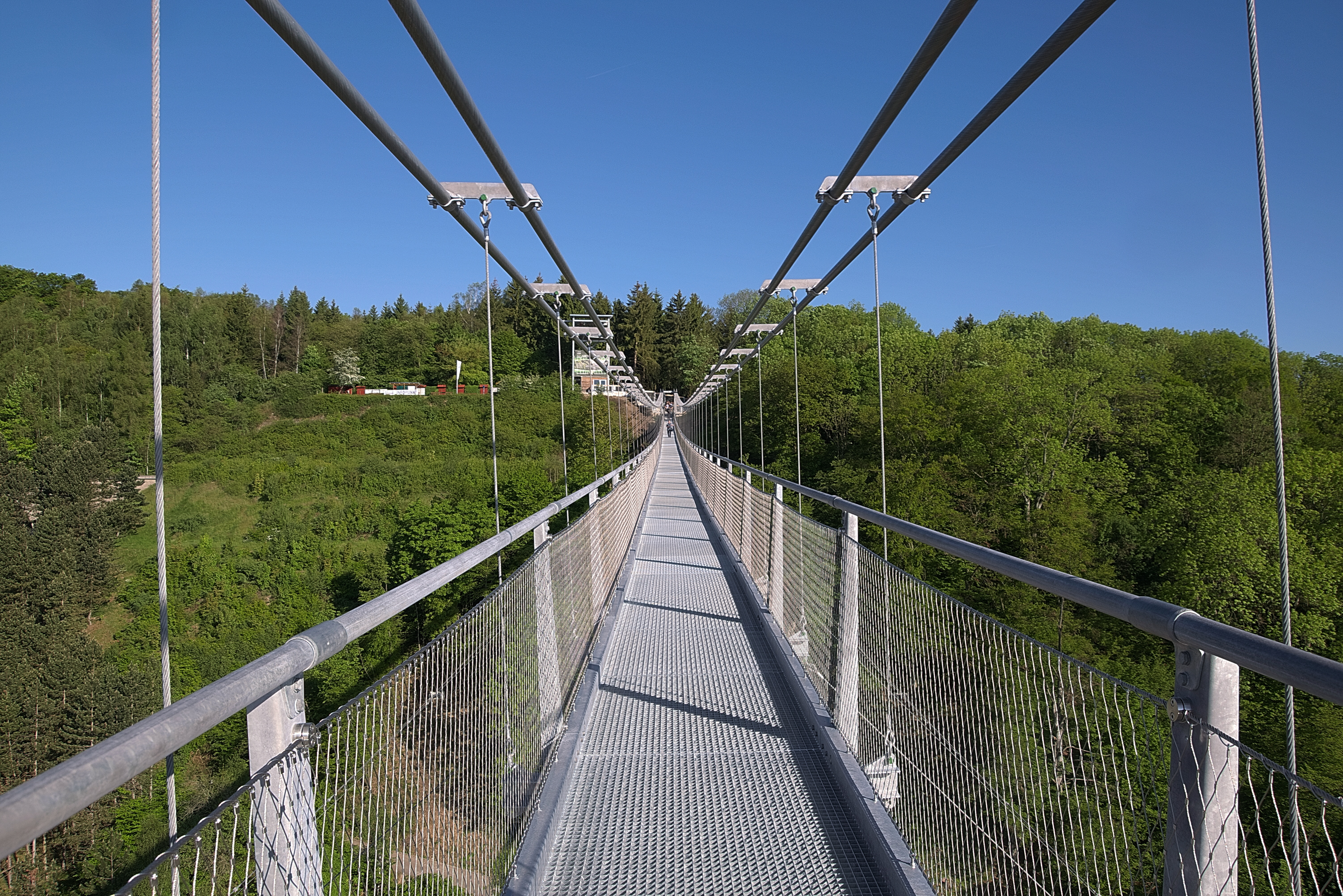 Hängebrücke Titan RT an der Rappbodestaumauer